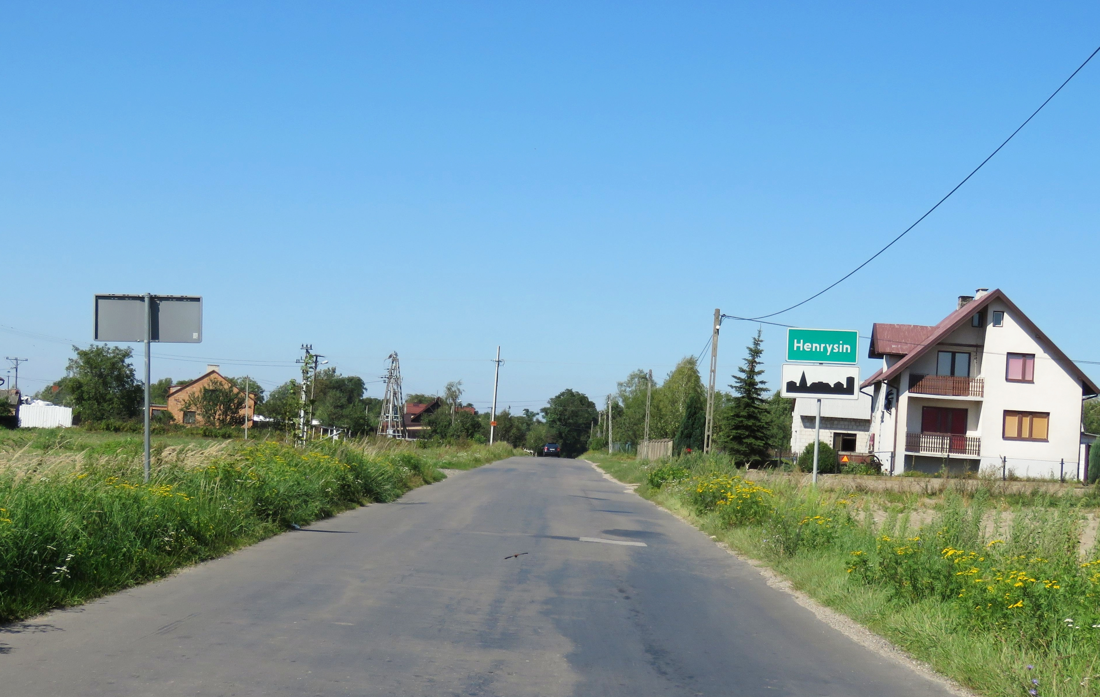 Henrysin